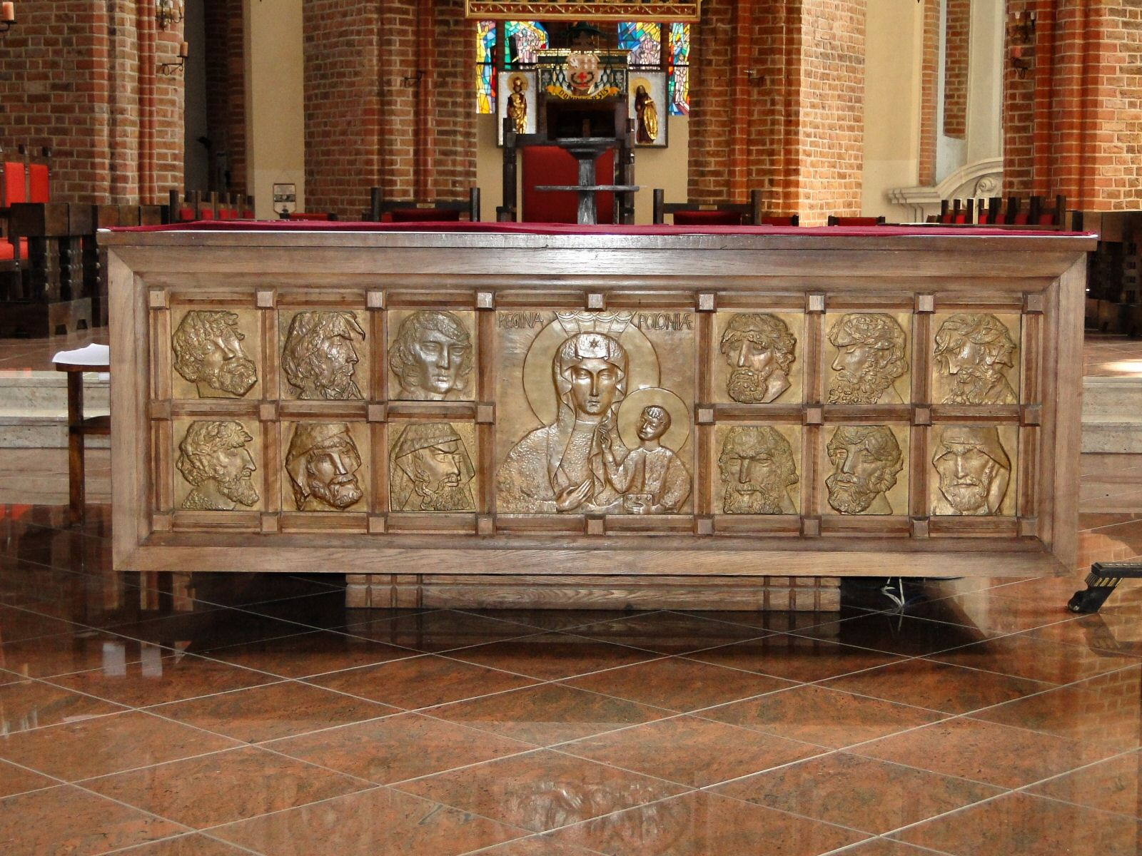 Stół ołtarzowy w Bazylice Katedralnej św. Jakuba w Szczecinie